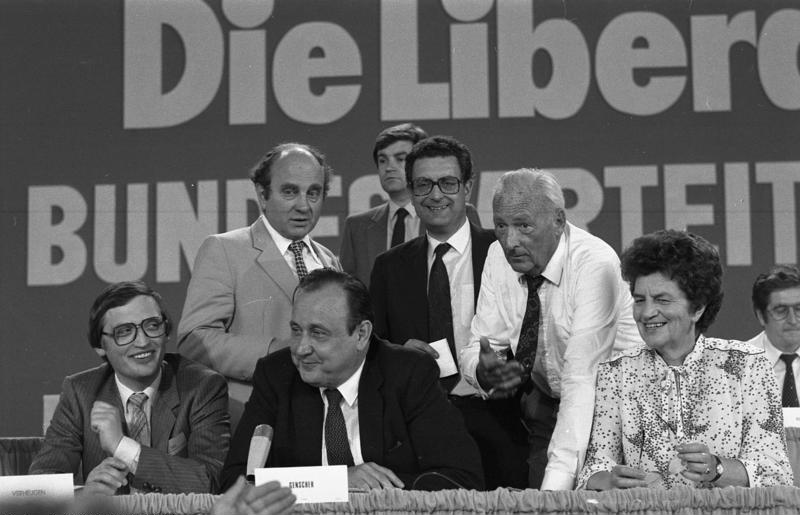 Außerordenlicher Bundesparteitag der FDP in Freiburg.